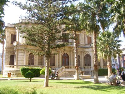 Limassol (Lemesos), Cyprus